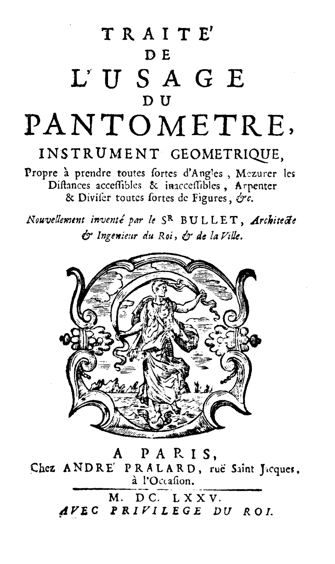 Traité de l'usage du pantomètre, instrument géometrique, propre à prendre toutes sortes d'angles, mezurer les distances accessibles & inaccessibles, ... nouvellement inventé par le Sr Bullet, architecte & ingégnieur du roi, & de la ville. - A Paris : chez André Pralard, ruë Saint Jacques, à l'Occasion, 1675 (A Paris : de l'imprimerie de la veuve d'Antoine Chrestien & Charles Guillery). - [20], 26, 187, [5] p. : ill. calcografiche ; 8º .